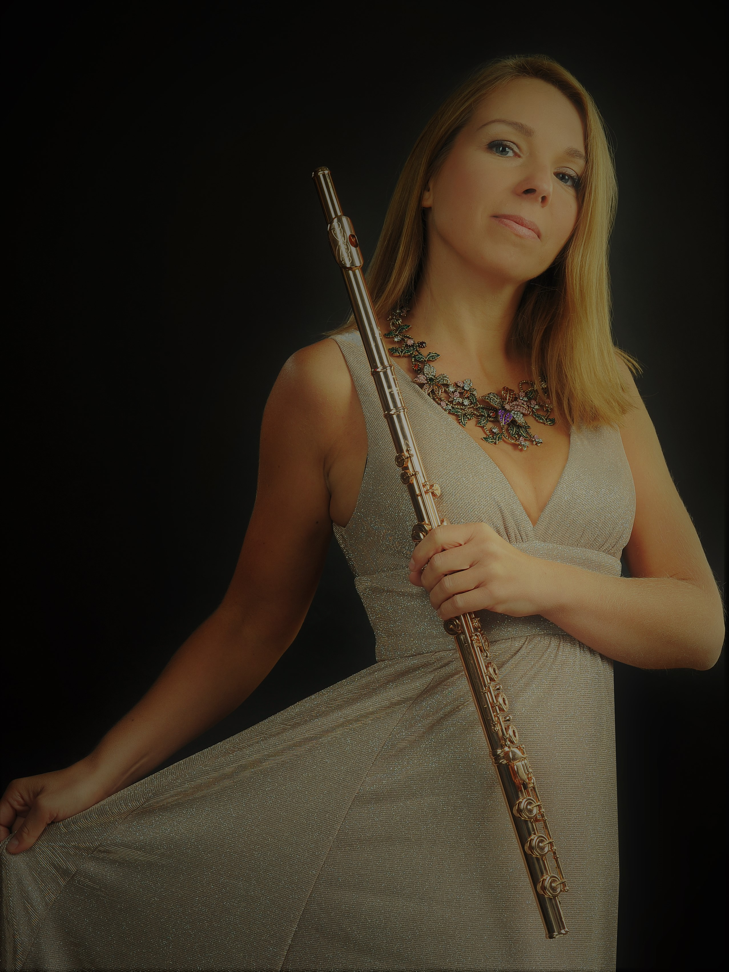 Agata Kielar-Długosz